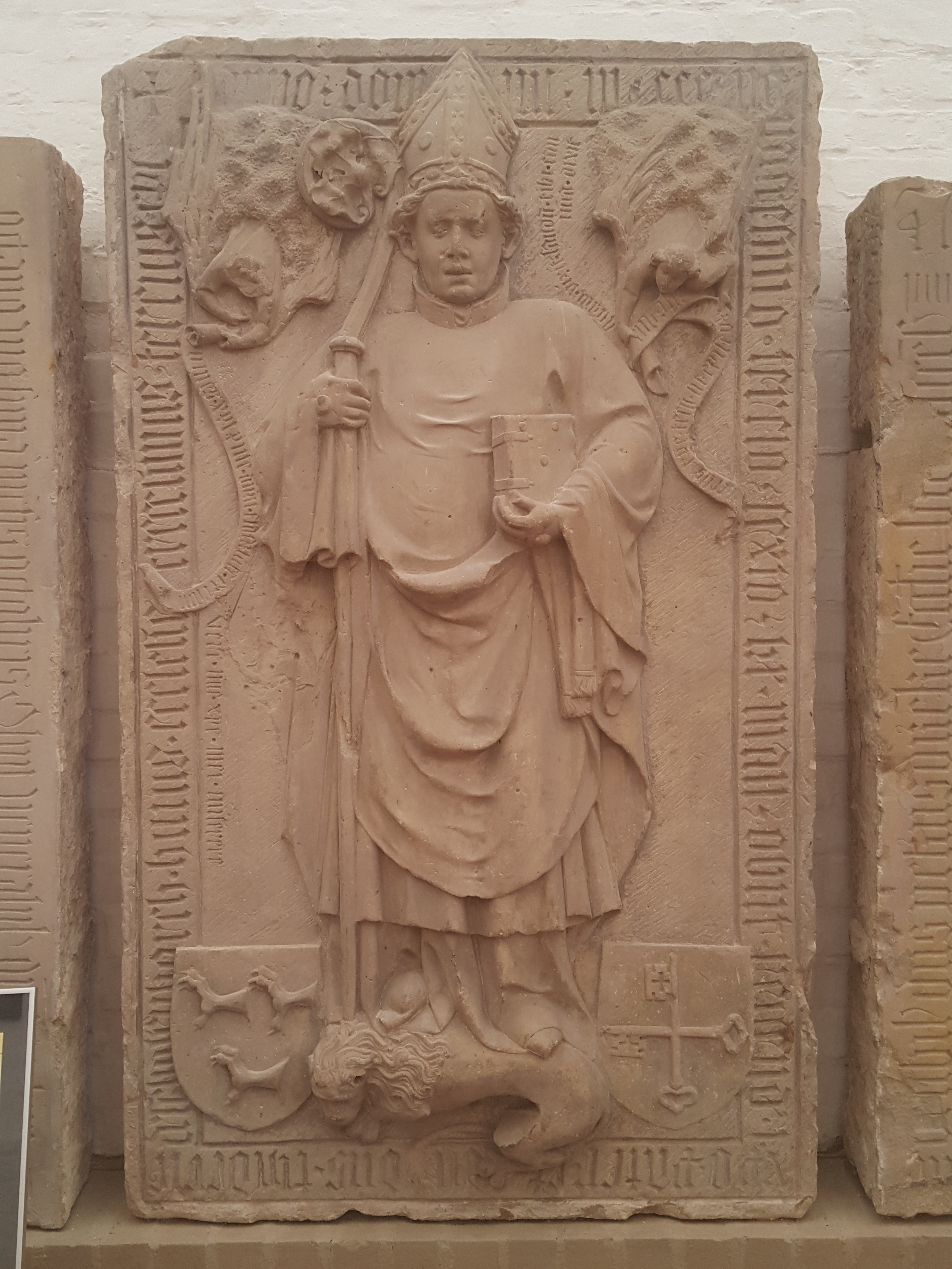 Grabplatte Bischofs Dietrich III., Dietrich von der Schulenburg; im Dom zu Brandenburg; Künstler unbekannt